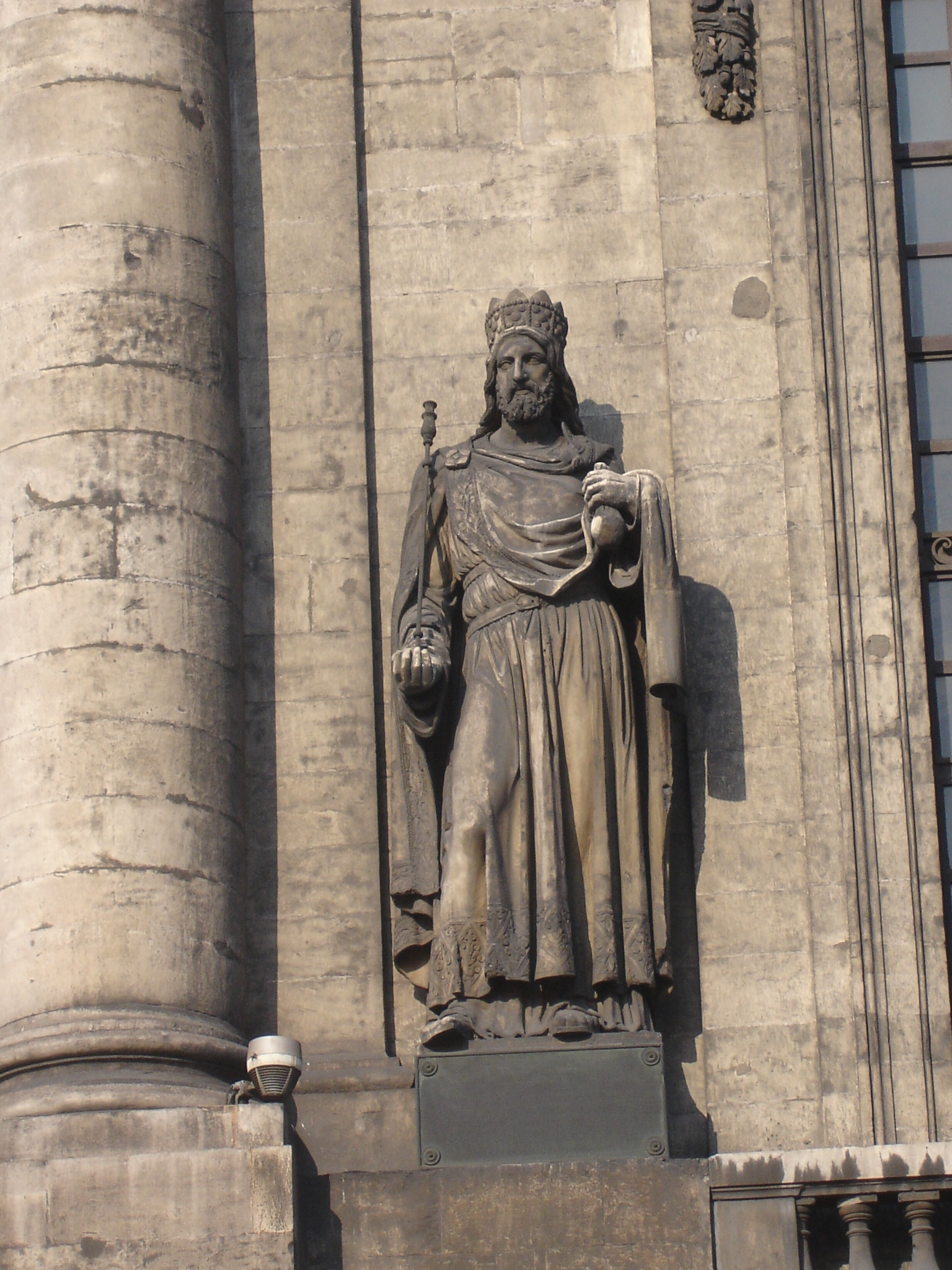 Lyon : L'hôtel Dieu, statue monumentale de l'entrée côté quai représentant le roi Childebert 1er. Sculpture de Pierre-Marie Prost (1776-1855).